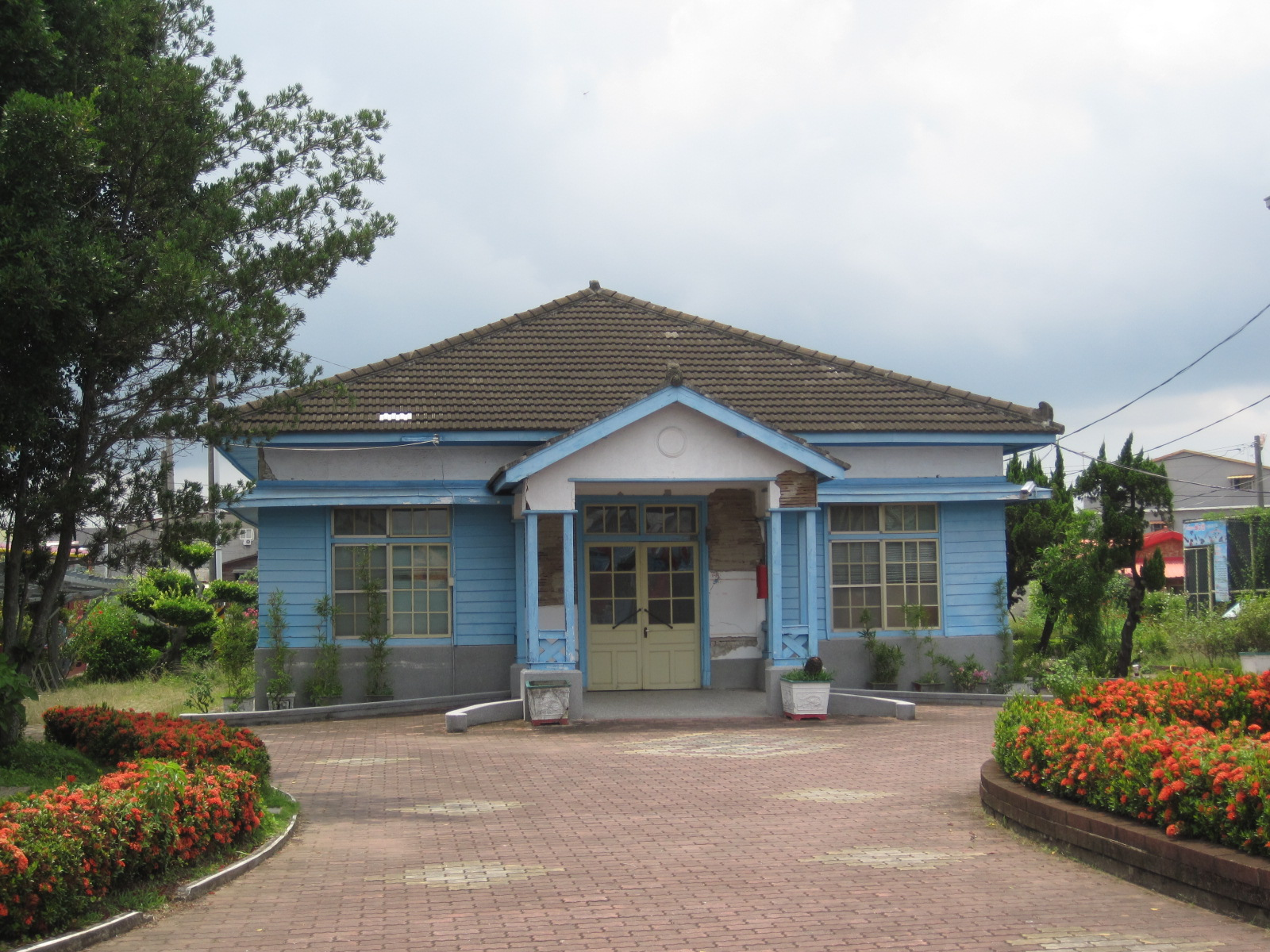 中文（台灣）: 臺灣臺南市後壁區菁寮國小原辦公室